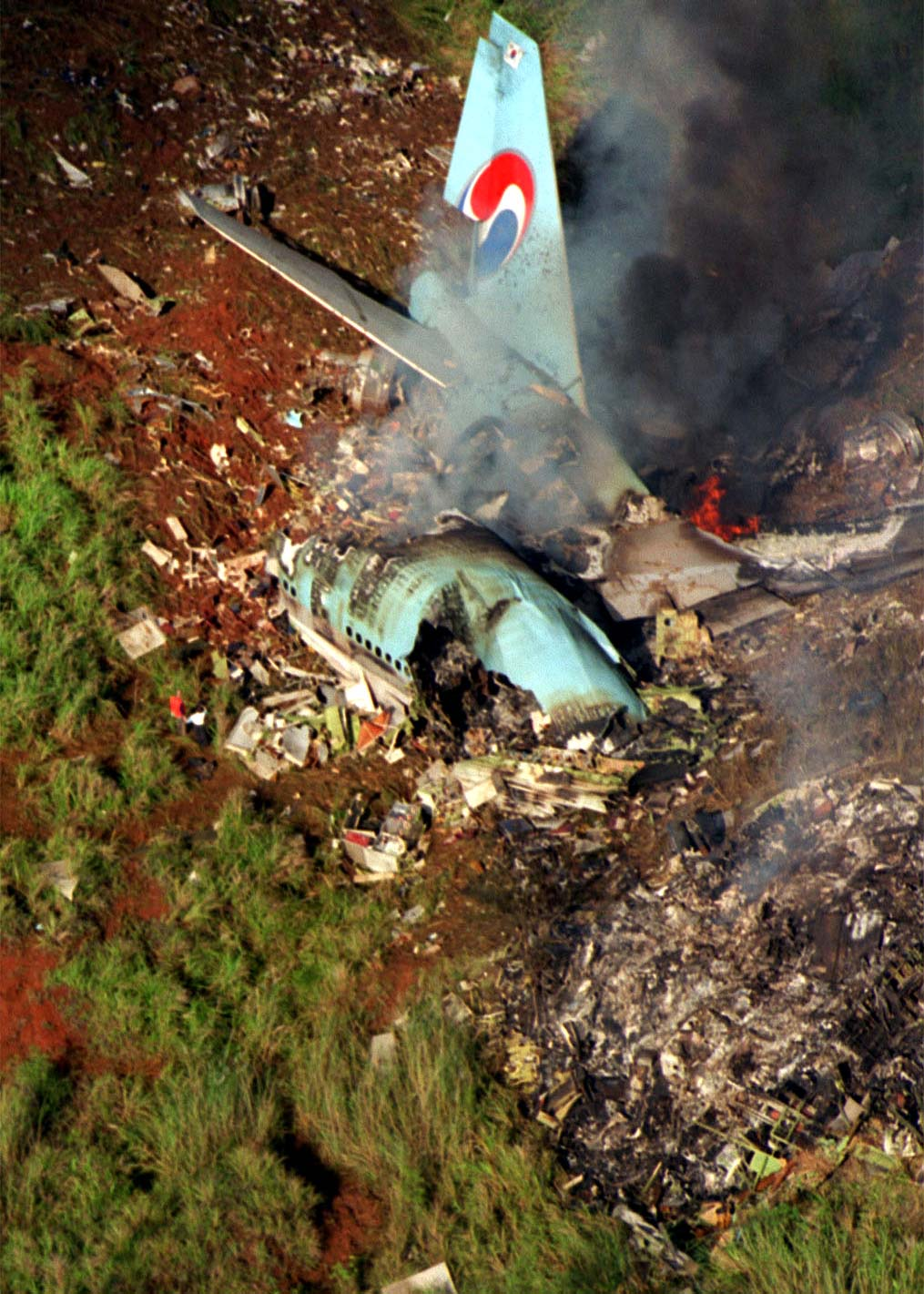 Flugzeugabsturz